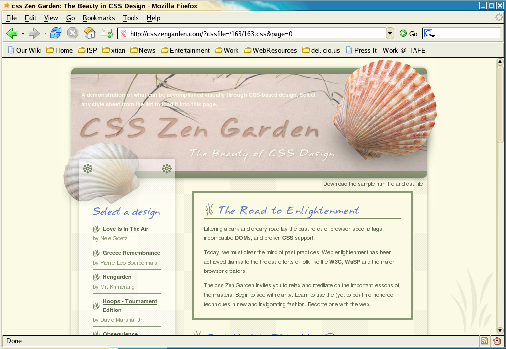 Design from CSS Zen Garden